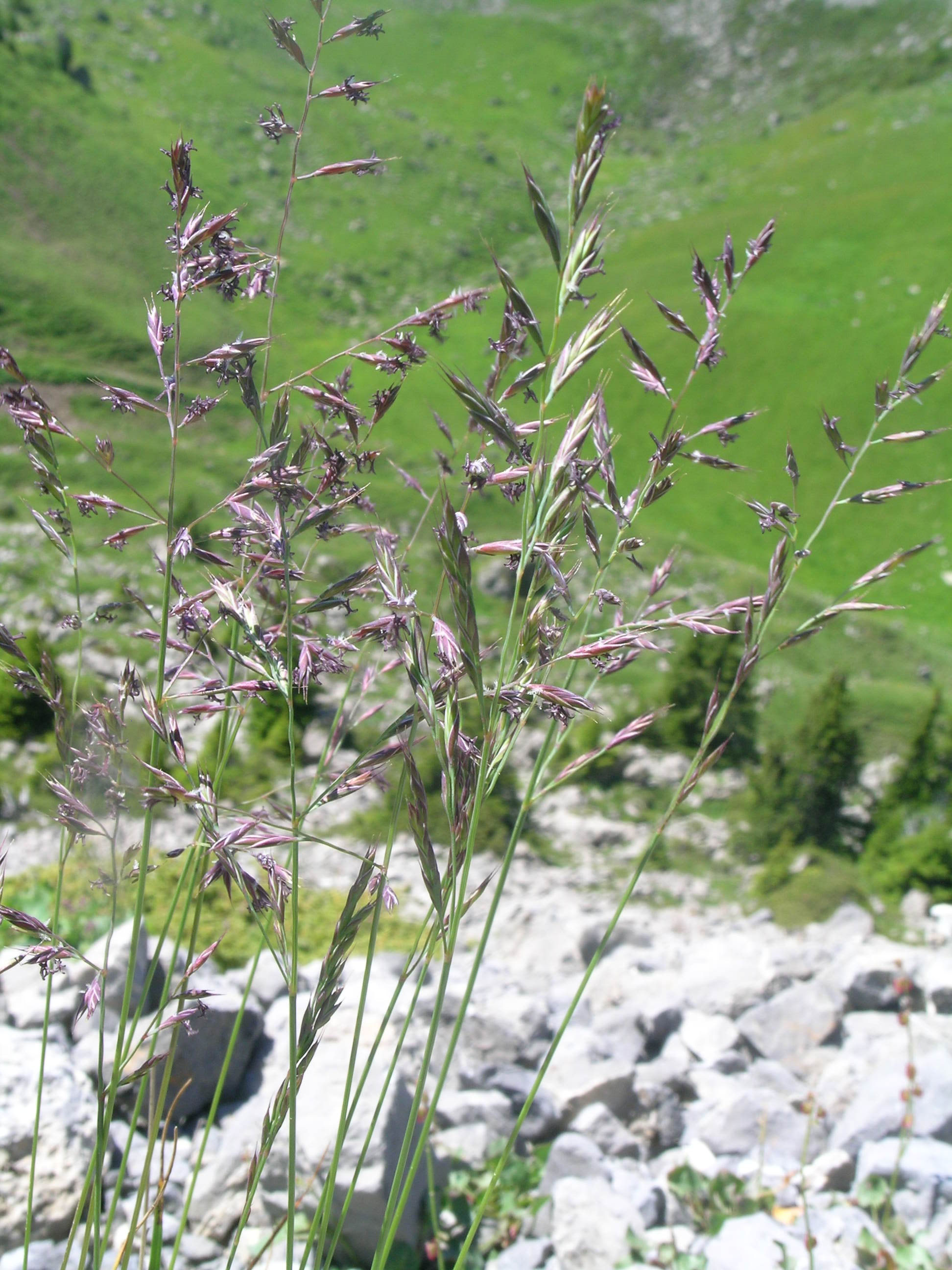 Festuca rubra, Schynige Platte, Kanton Bern, Schweiz